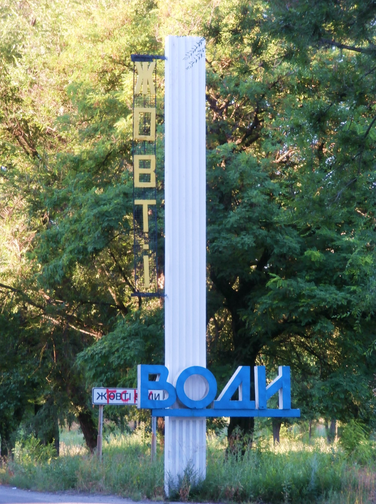 Schowti Wody Ortseingangsschild an der T0148 von Krywyj Rih kommend